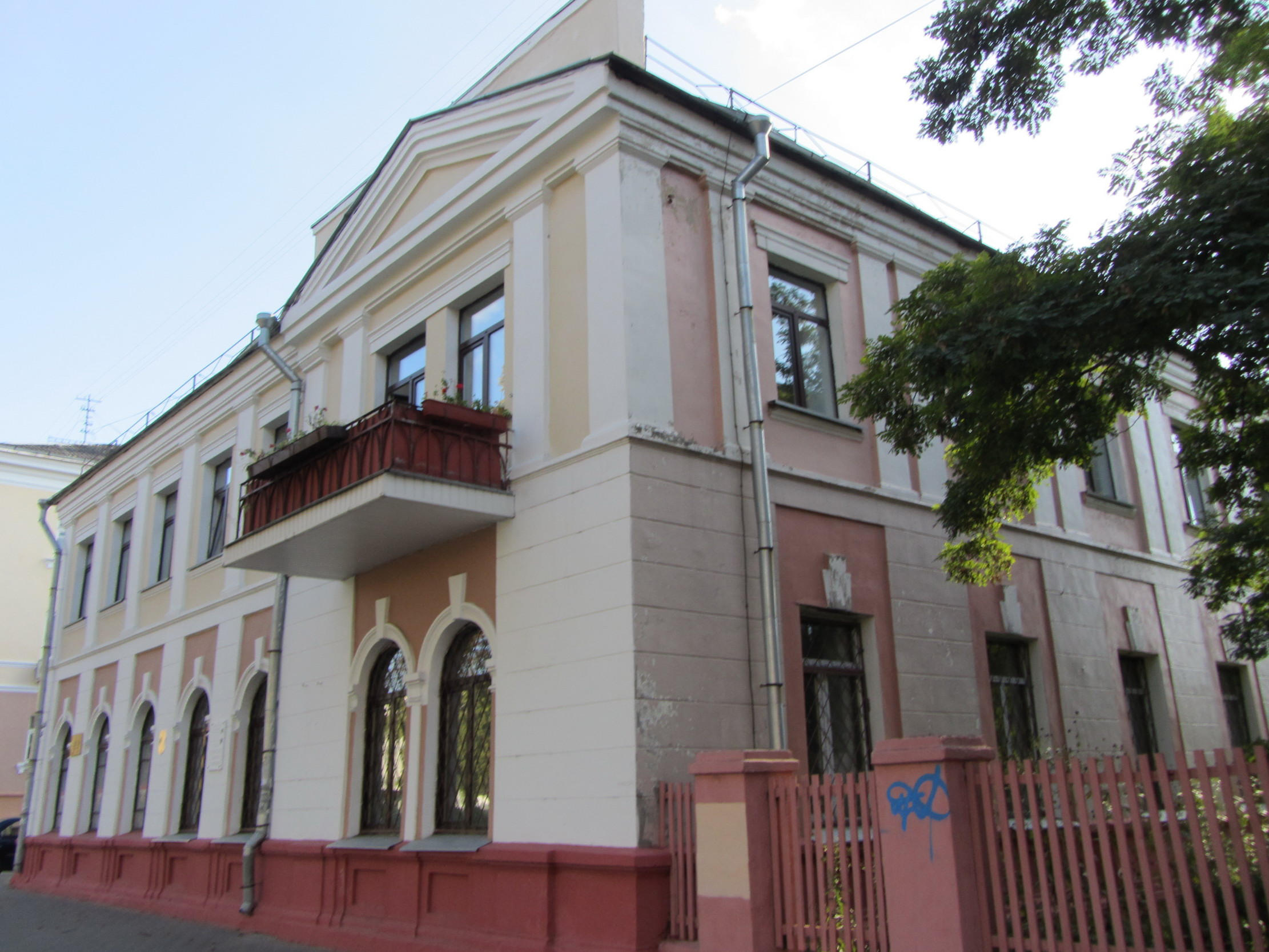 Беларуская (тарашкевіца): Будынак (тып гарадзкога маёнтка). г. Гомель This is a photo of Belarusian heritage monument. Reference number: 313Г000086 ( WLM)